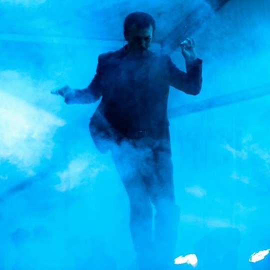 Le très célèbre comédien tunisien Lotfi Abdelli aux sommets de ses arts dans une soirée mémorable à l'IHEC Carthage